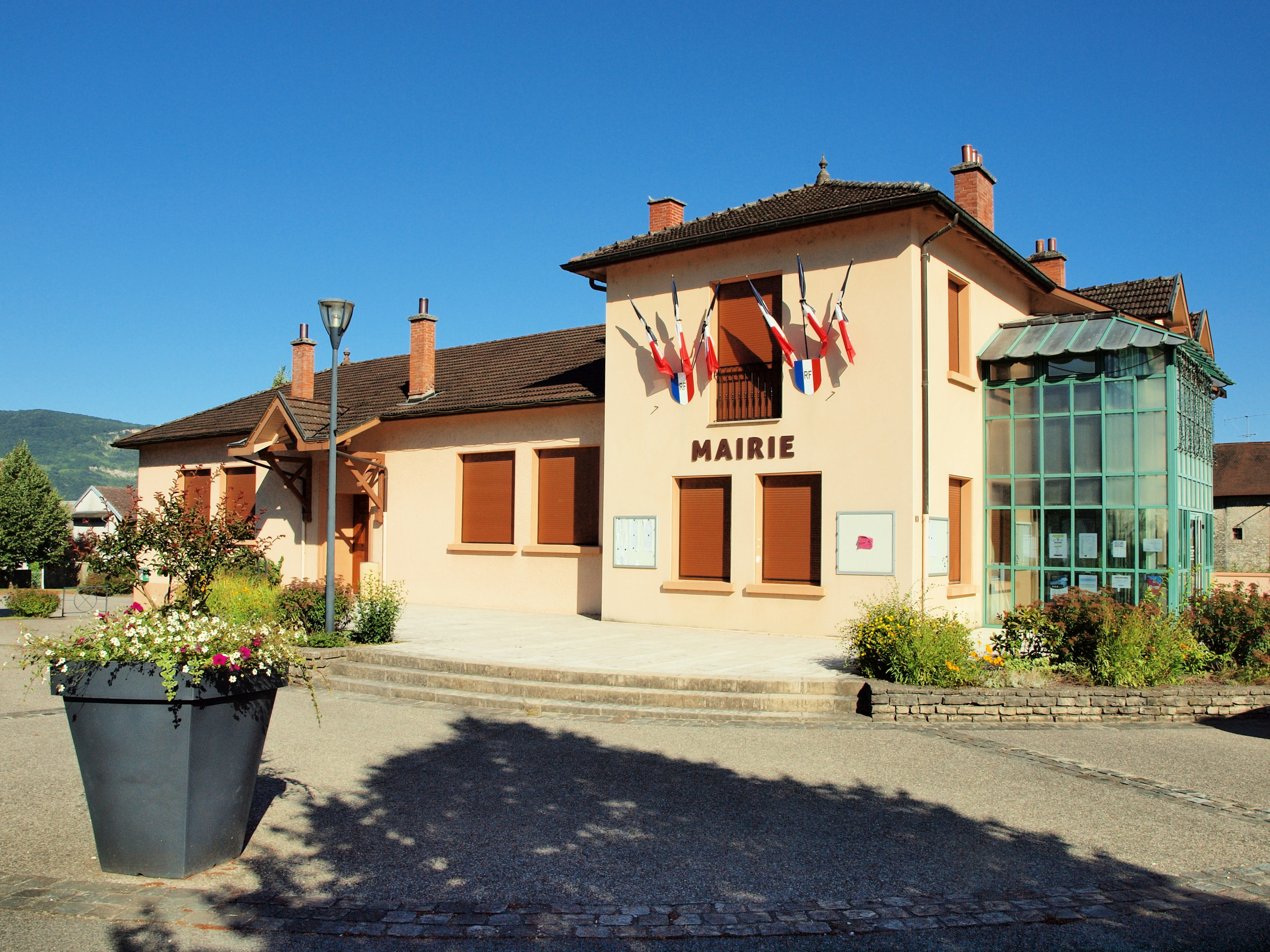 Bouvesse-Quirieu (Isère, France)